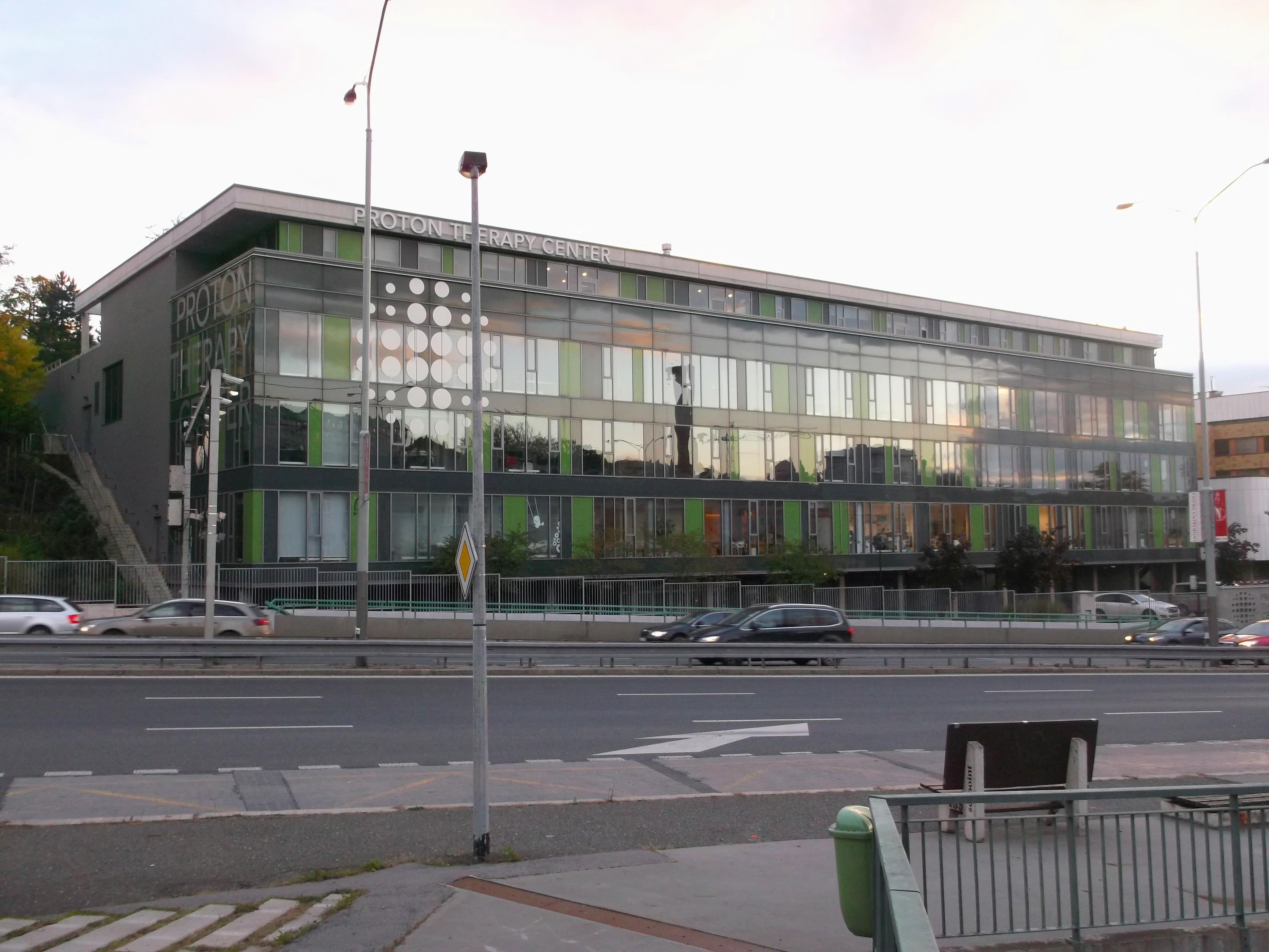 Praha - Libeň, Protonové centrum